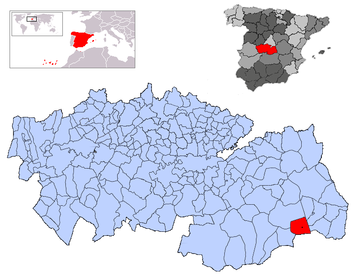 Quero en la provincia de Toledo